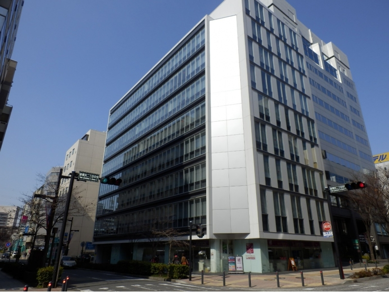 Abas shinyokohama